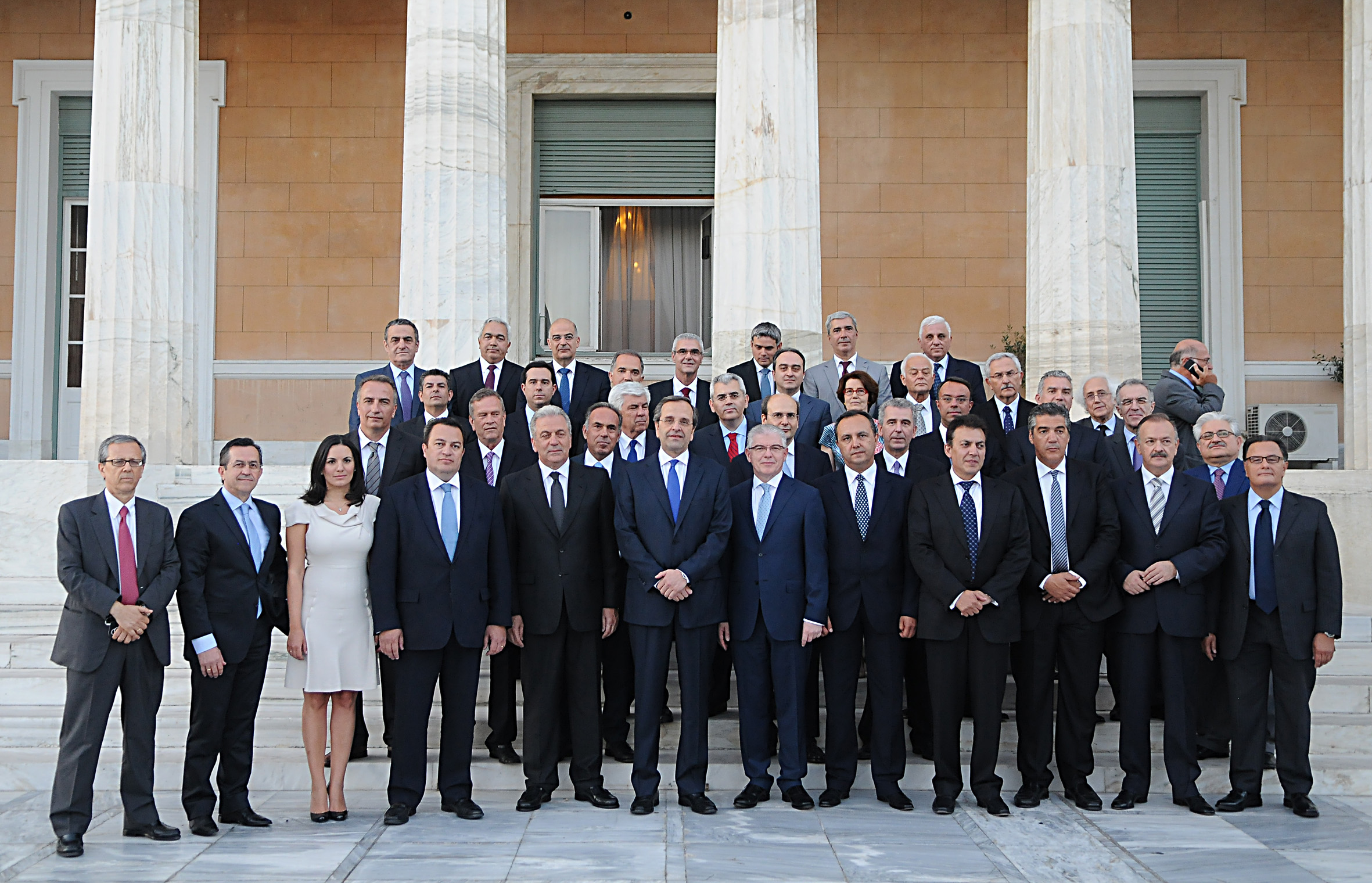 Ο ΠΡΩΘΥΠΟΥΡΓΟΣ ΑΝΤ.ΣΑΜΑΡΑΣ ΚΑΙ Η ΚΥΒΕΡΝΗΣΗ 1